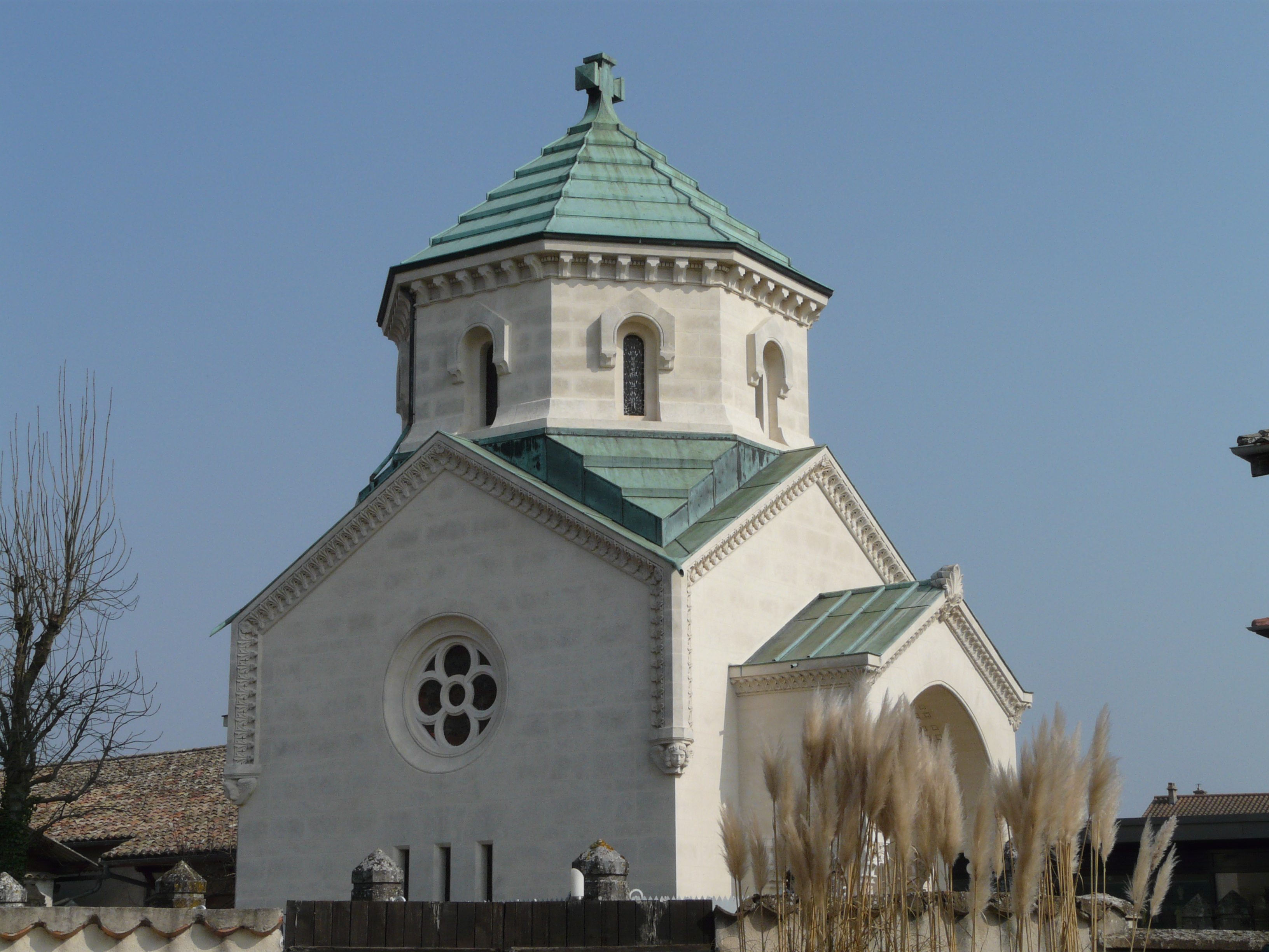 La chapelle dite "du coeur" à Ars-sur-Formans, abritant la relique du coeur du curé d'Ars